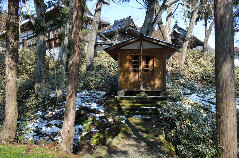 准低観音堂